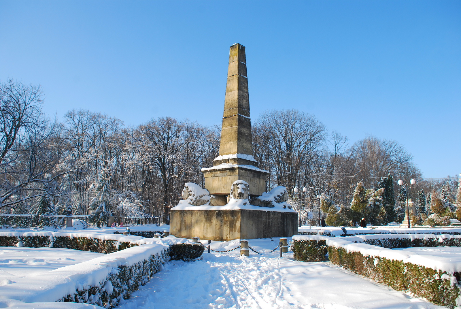 Obeliscul leilor